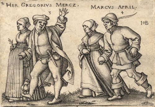 Die Monate März und April, aus Das Bauernfest oder die zwölf Monate